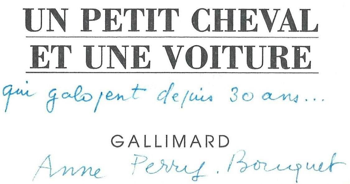 Scan (partiel) d'une dédicace de l'écrivain Anne Perry-Bouquet sur son premier roman Un petit cheval et une voiture lors de la réédition de celui-ci en 1996, soit trente ans après la première édition de 1966. L'original complet contient un dessin de l'auteur au stylographe représentant un cheval au galop tirant un landau dans lequel est assis un enfant aux bras levés. (Collection personnelle)